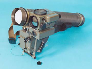 略称：LMAT 愛称：ラット [システム重量]約17.5kg [開発]防衛庁技術研究本部 [製作]川崎重工 普通科部隊に装備し、主として近距離域の対機甲戦闘において、敵戦車などを撃破するために使用する。 ja:01式軽対戦車誘導弾